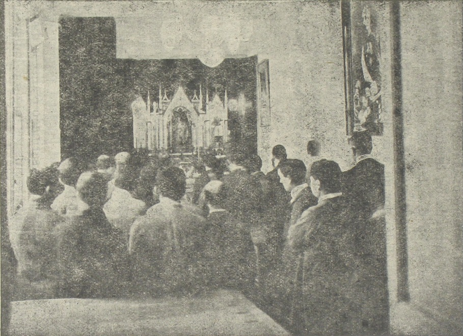 Talleres de "El Correo Español": El personal oyendo Misa en día festivo, desde la Sala de Redacción.